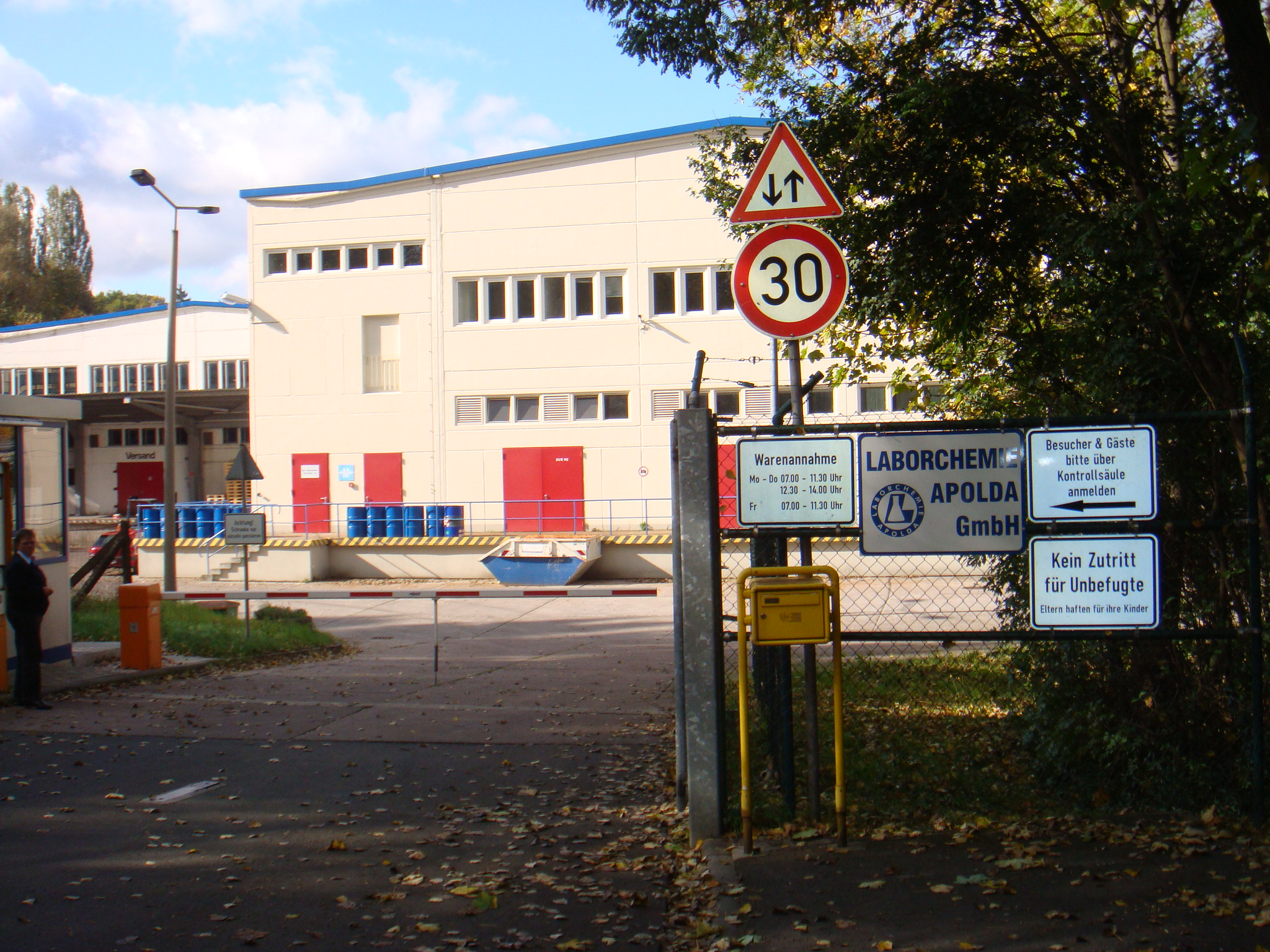 Laborchemie GmbH